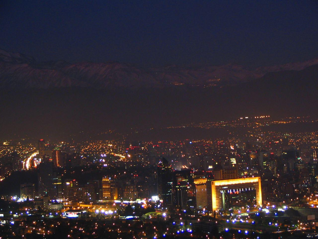 Santiago Oriente por la noche. A la derecha se vee el centro financiero de Santiago, a la derecha la Av. Kennedy con el Hotel Hyatt y Marriott y las luces de mas arriba son los centros de Ski.